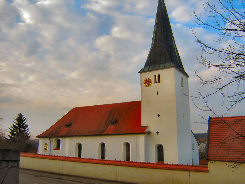 Kirche von Gansheim, Church of Gansheim